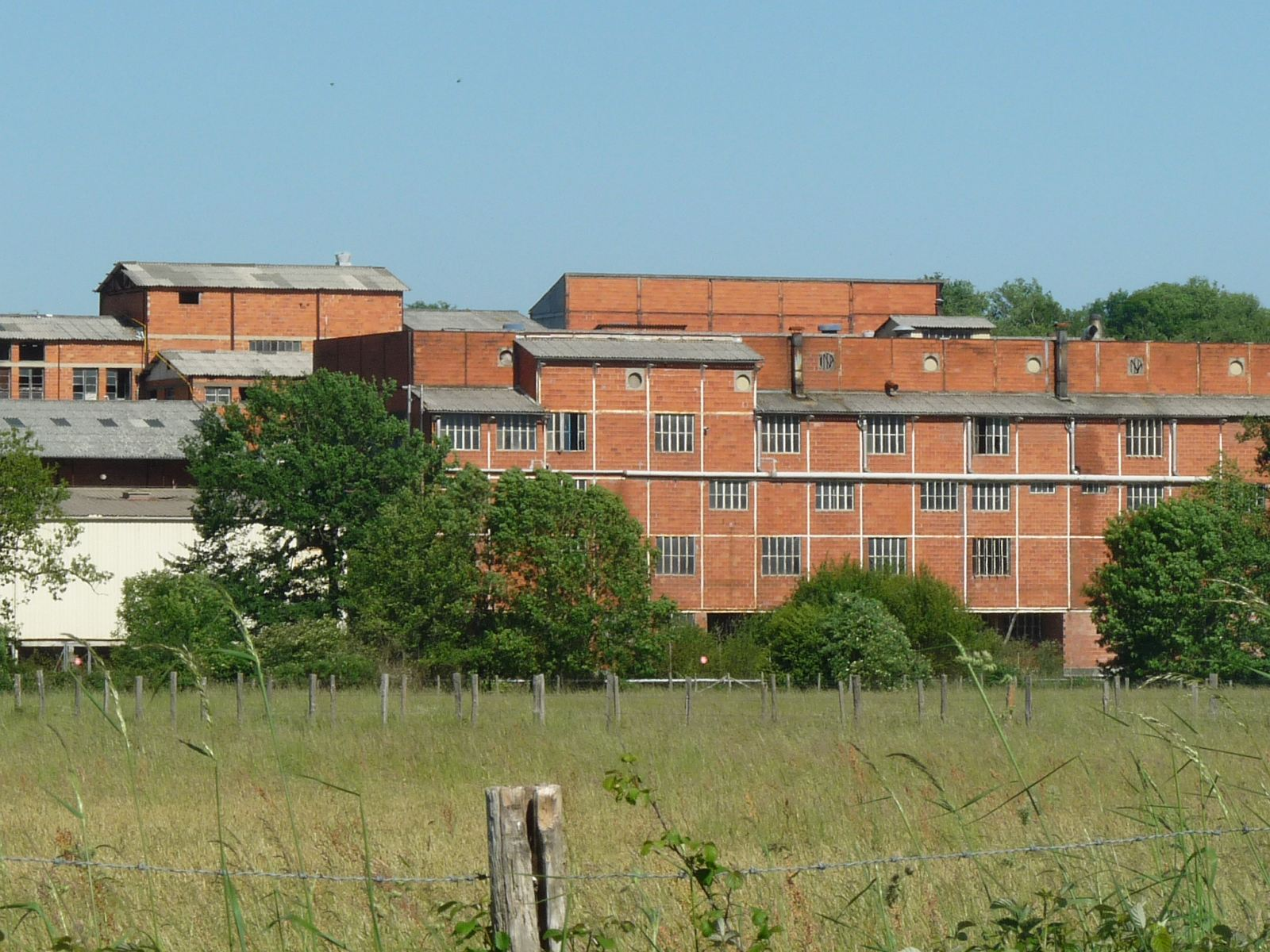 ancienne usine Chaignaud, textile et caoutchouc, La Rochefoucauld, Charente, France